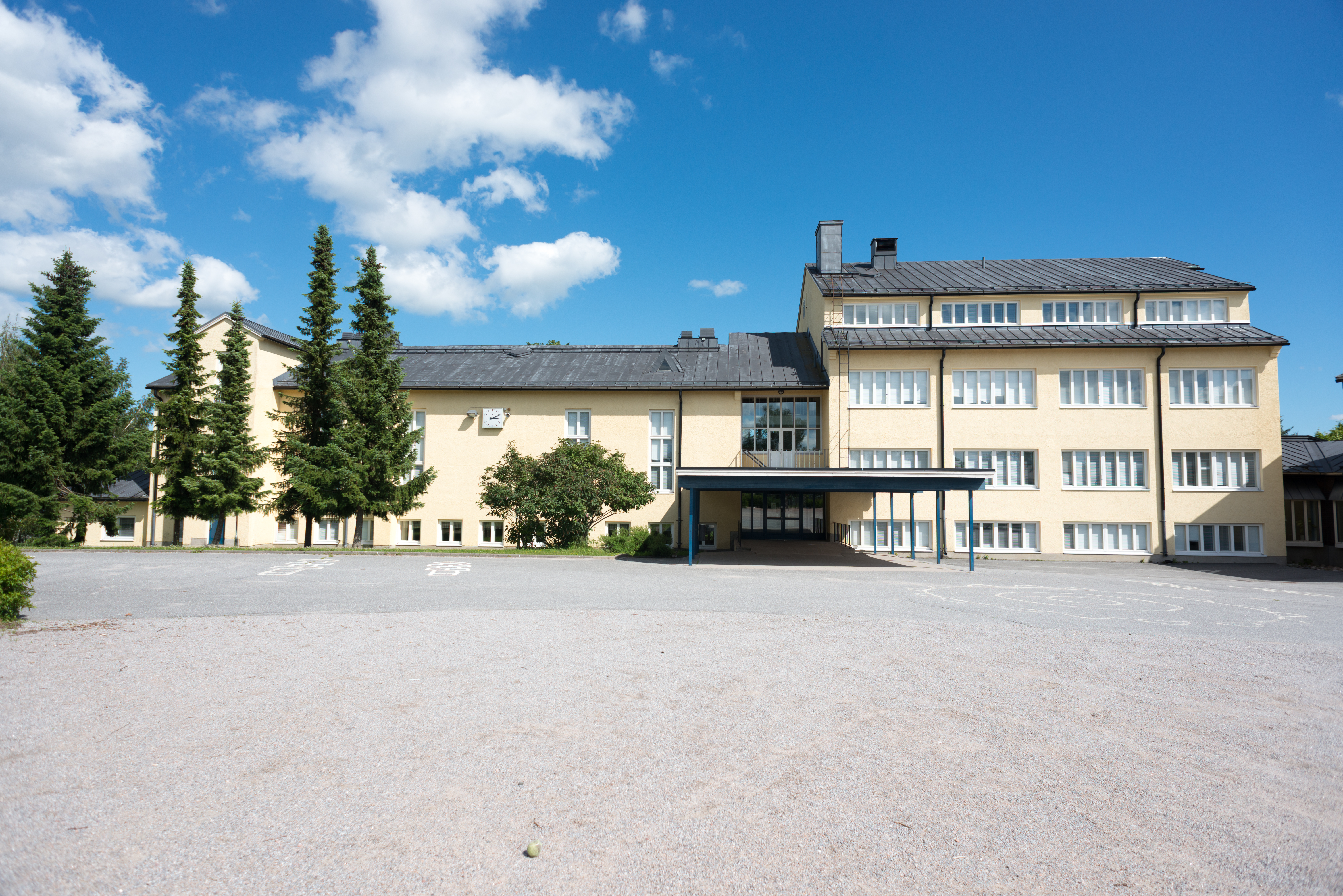 Alhaisten koulu Salossa